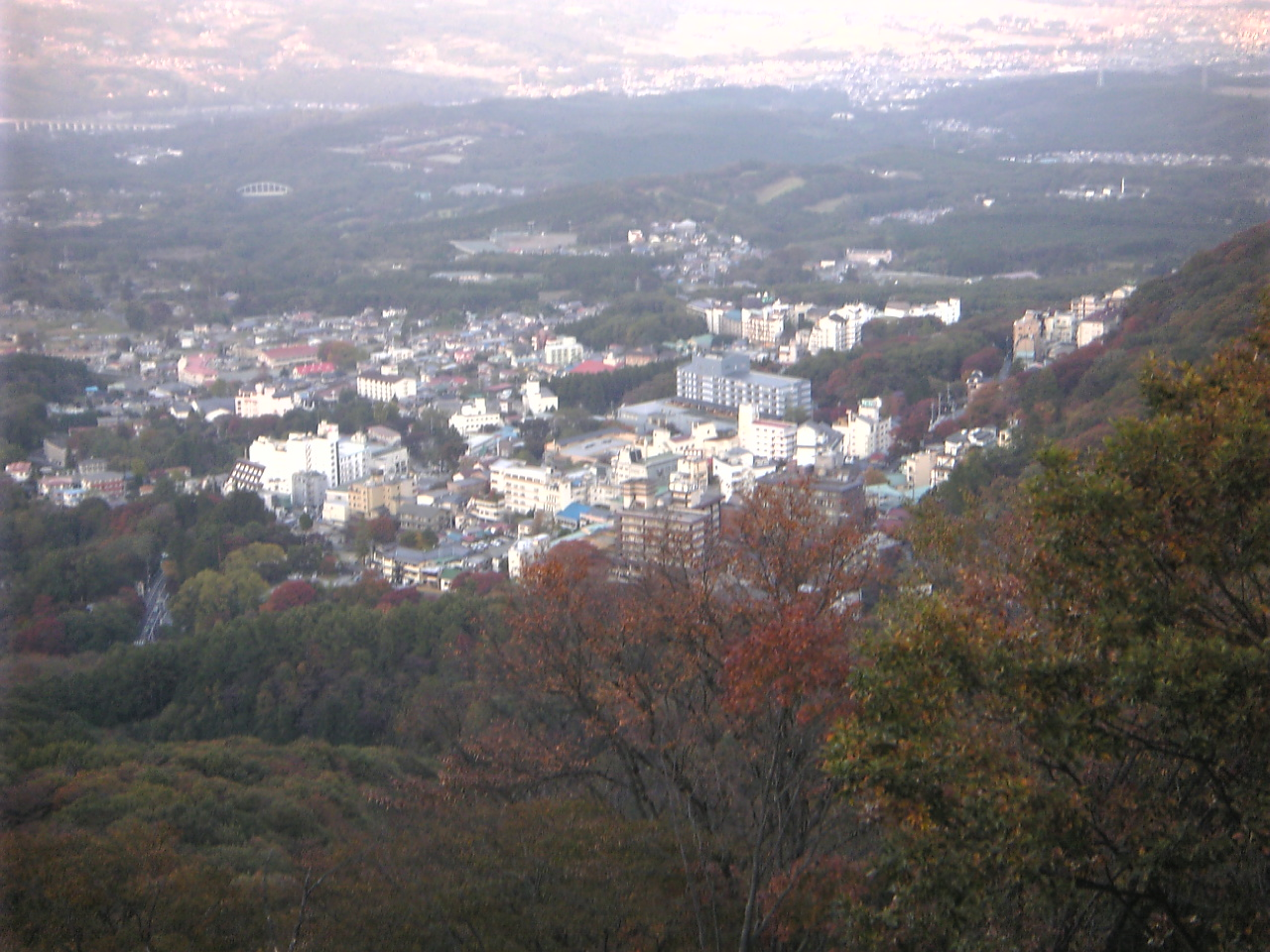 伊香保温泉